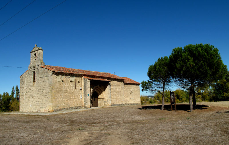 Ermita de San Antón en el pueblo de La Nave (Miranda de Ebro, España)